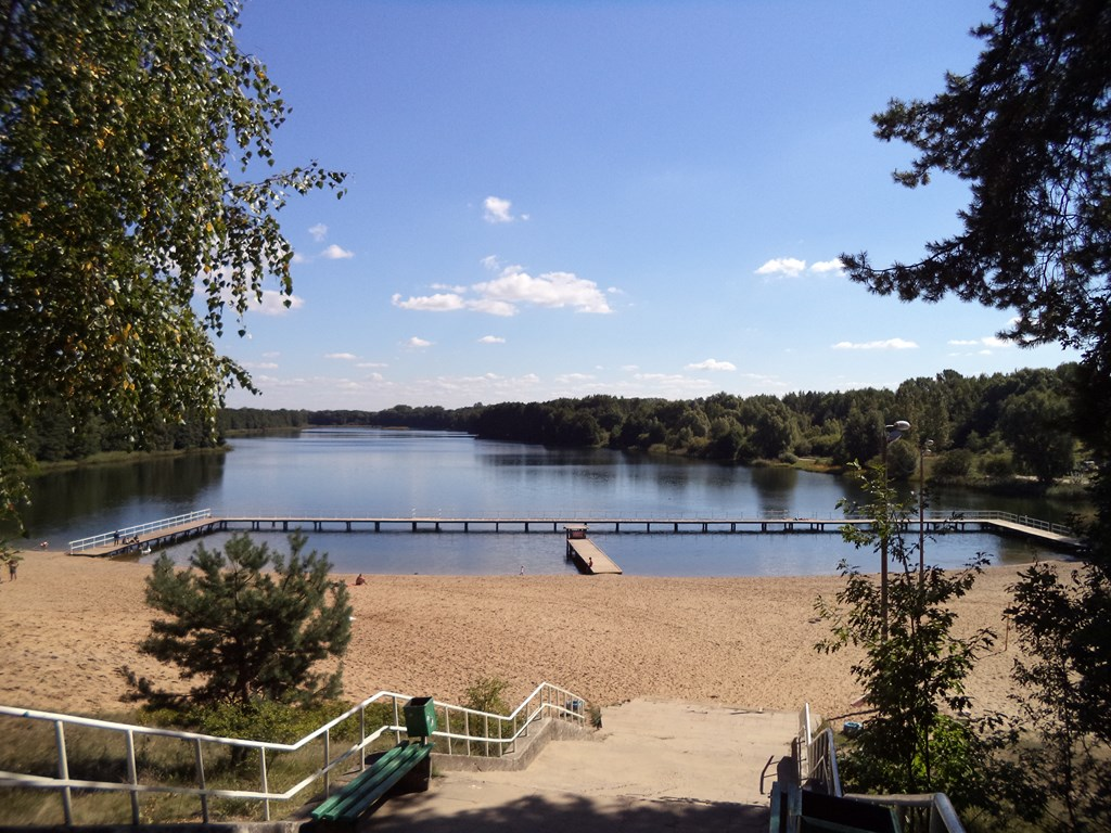 Jezioro Sajmino (Ostróda)